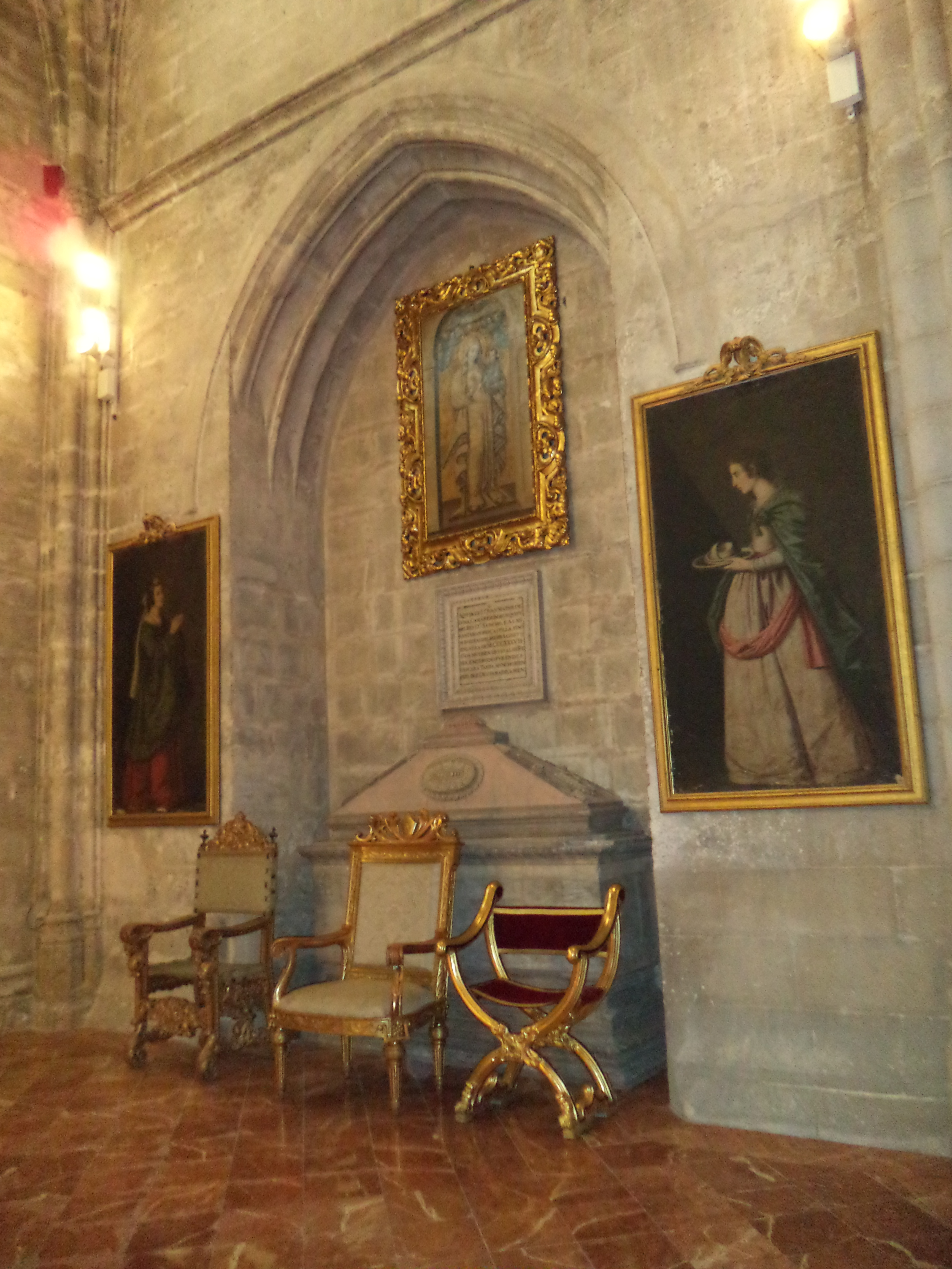 Sepulcro de Juan Mathé de Luna (c. 1250-1299), que fue almirante de Castilla y camarero mayor del rey, en la capilla de San Hermenegildo de la catedral de Sevilla, (España). Por encima de la tumba puede verse una copia del siglo XVIII de la pintura de la Virgen de la Antigua conservada en la capilla de la Virgen de la Antigua de la catedral de Sevilla, y a ambos lados de la tumba hay dos lienzos que representan a Santa Engracia y Santa Rufina.